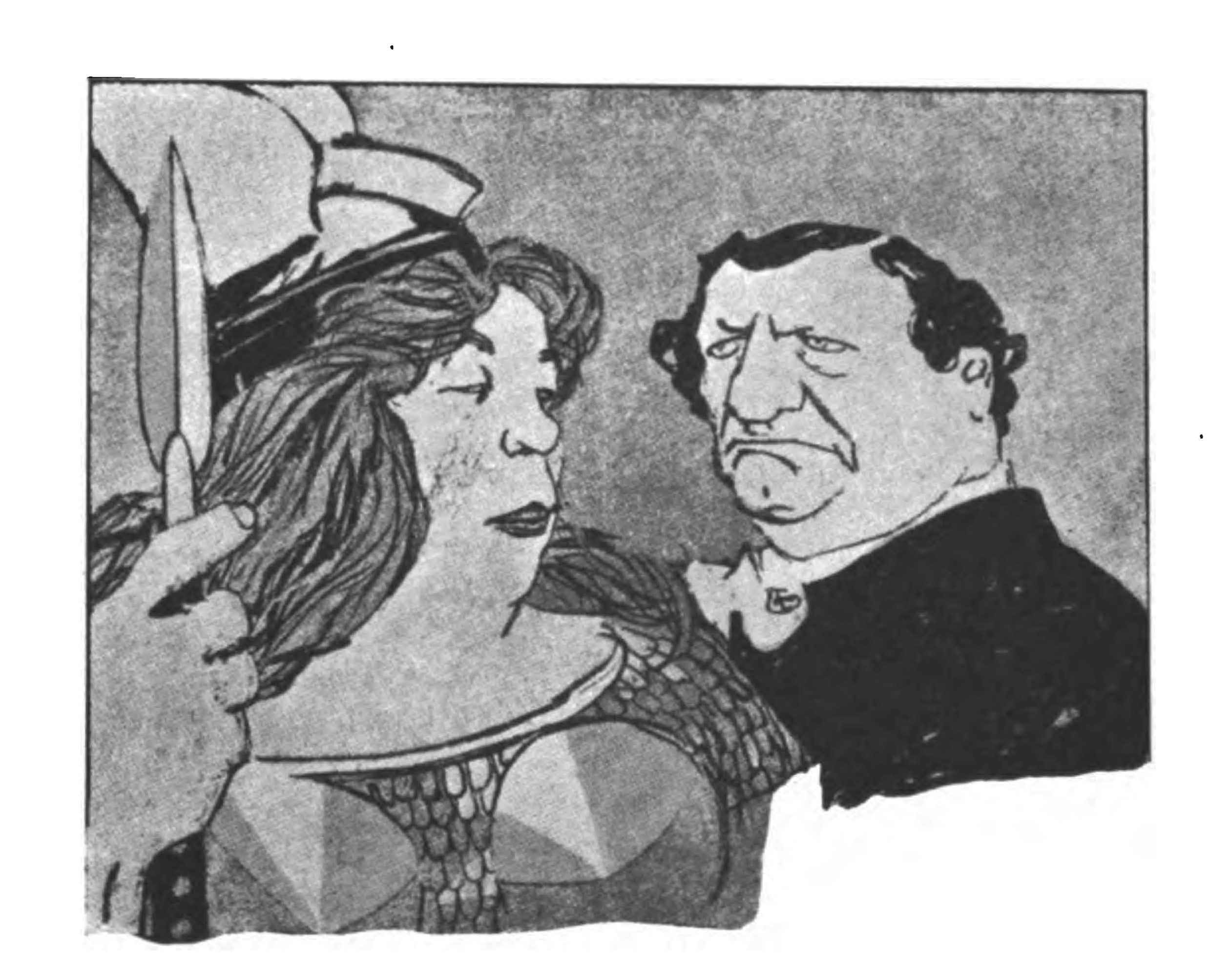 Walküren. "Keine unserer Sängerinnen wiegt unter hundert Kilo; wir können also nur noch Wagneropern geben."